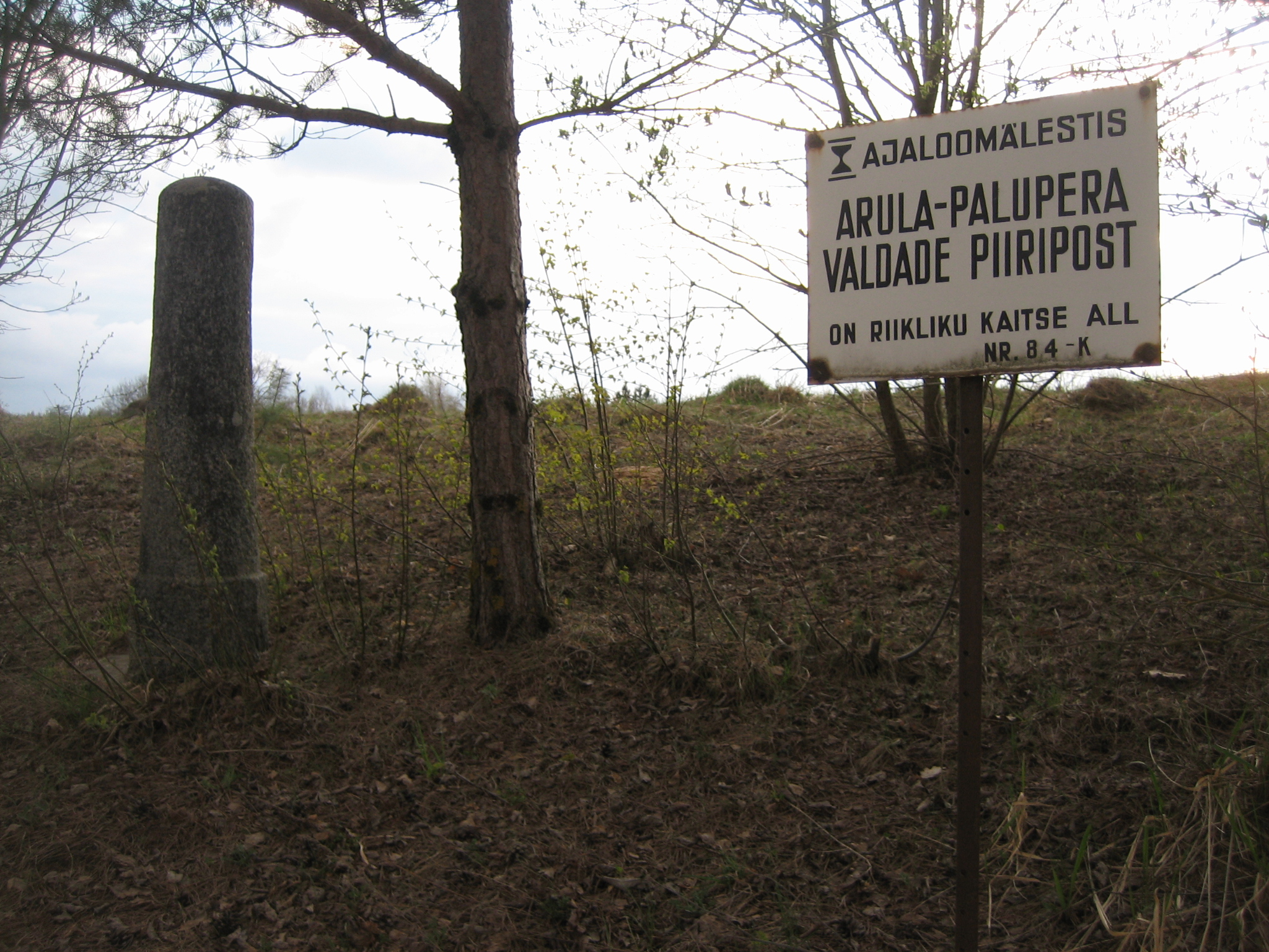 Arula ja Palupera valla piiripost asub Arula-Palu tee 1,6 km.